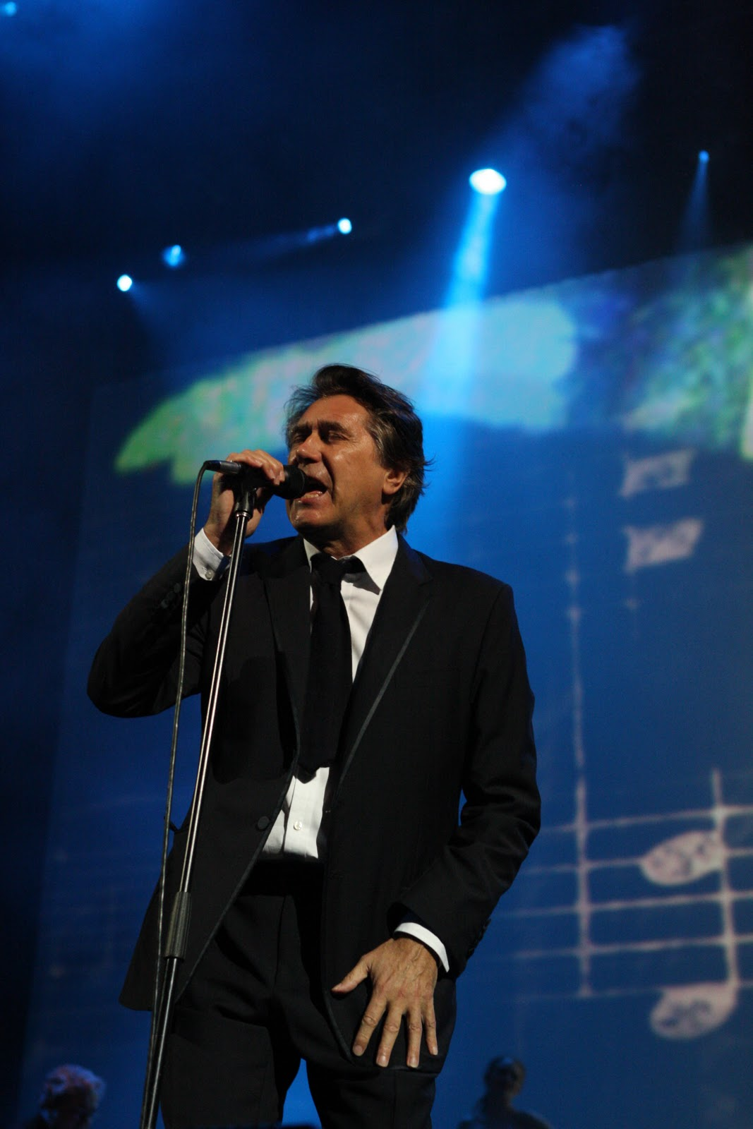 Bryan Ferry